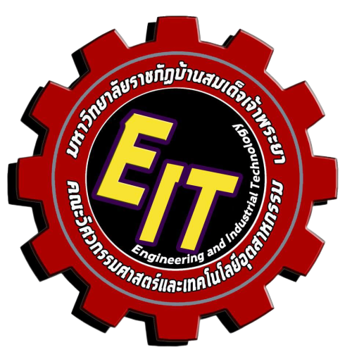 ตราสัญลักษณ์ประจำคณะวิศวกรรมศาสตร์และเทคโนโลยีอุตสาหกรรม บ้านสมเด็จฯ